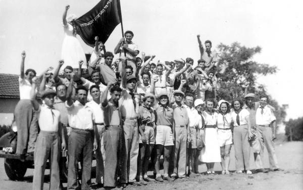 חברי גן-שמואל יוצאים להפגנת האחד במאי בחדרה 1940